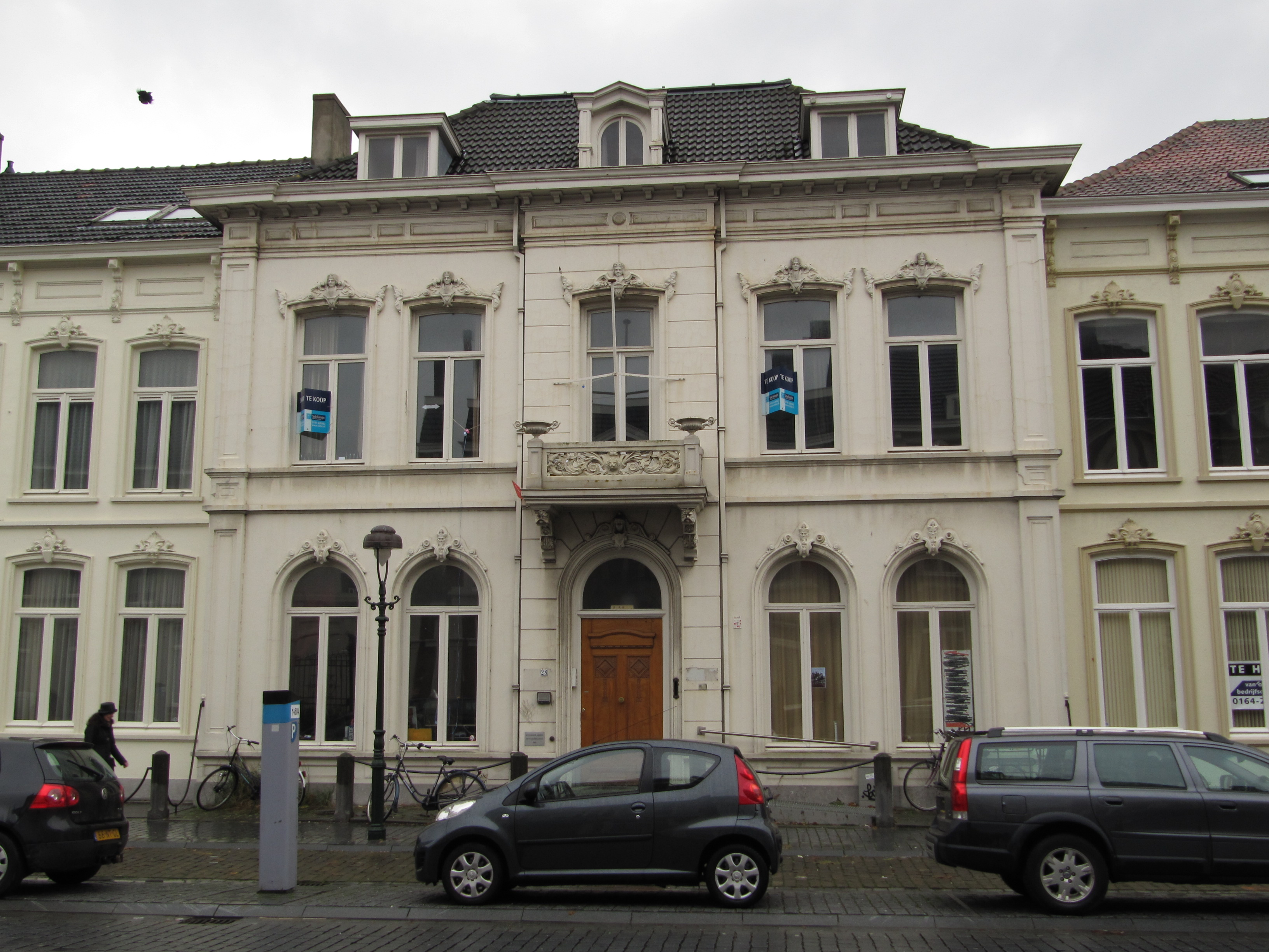 RM525800 Bergen op Zoom - Stationsstraat 28.jpg